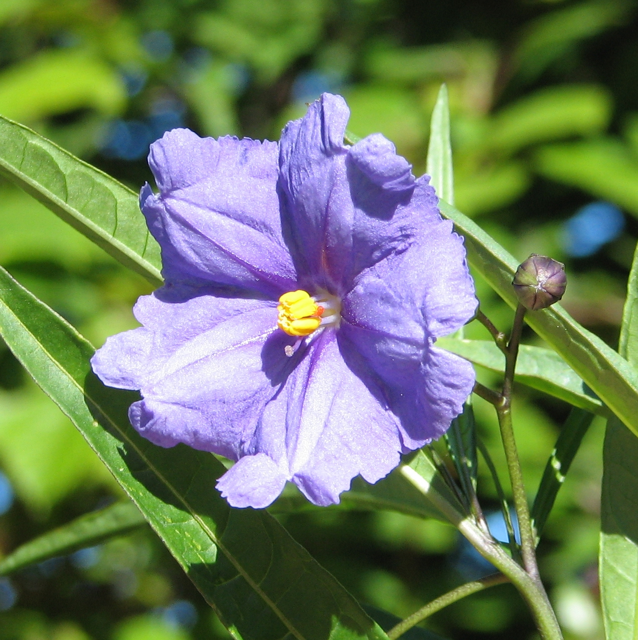 Solanum aviculare flower